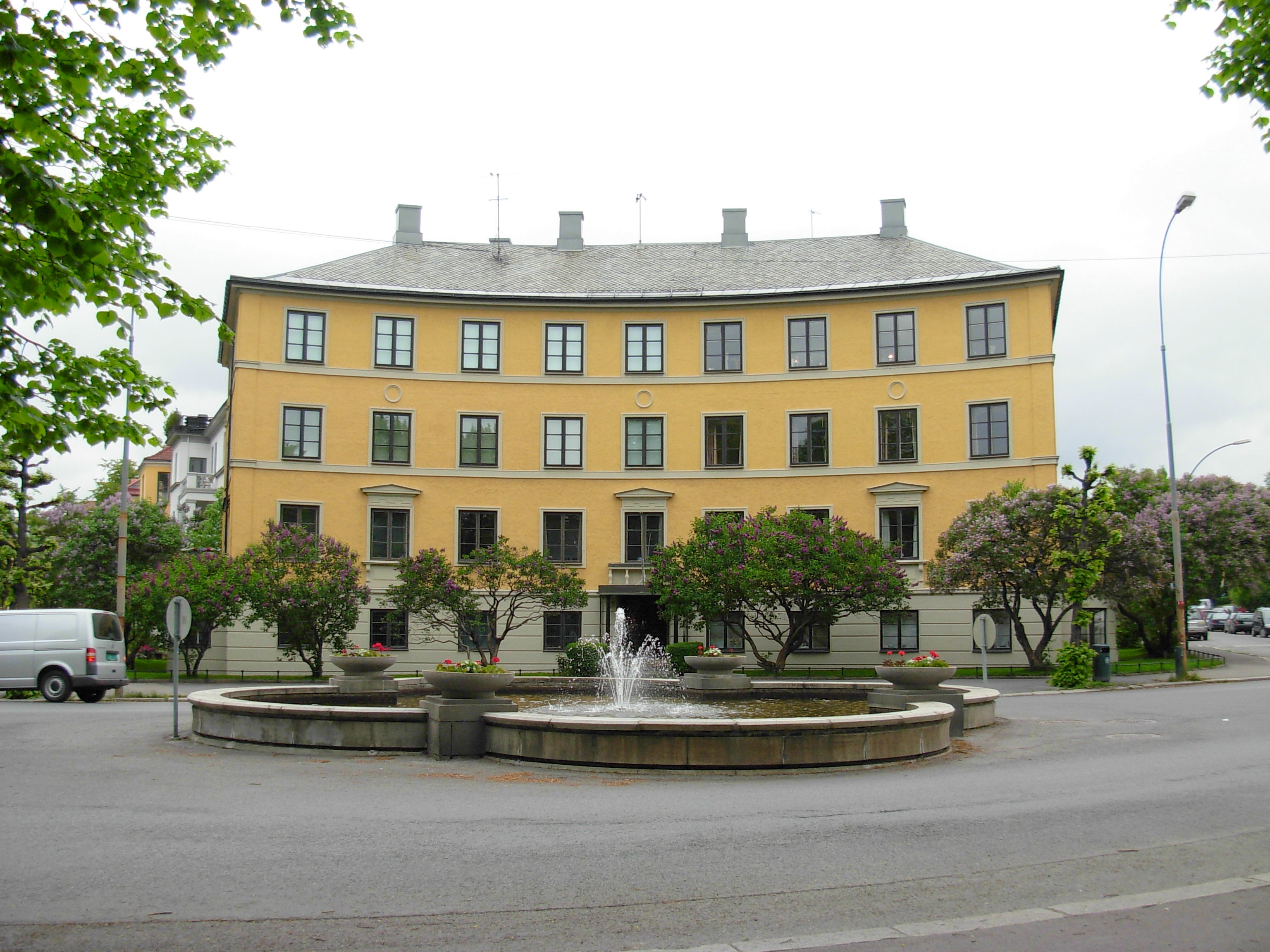 Arno Bergs plass, Briskeby, Oslo. Huset på bildet har adresse Gyldenløves gate 27. Arkitekt: Paul Norr (1925).